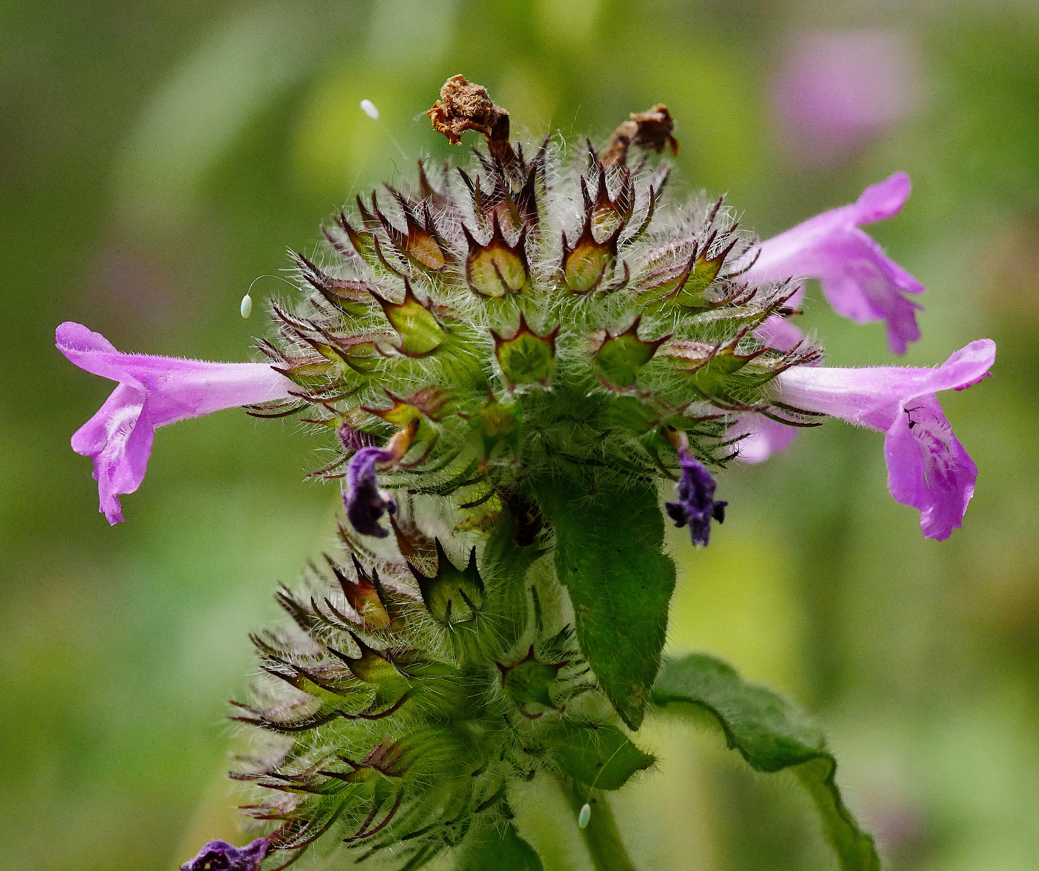 Gemeiner Wirbeldost (Clinopodium vulgare) im Freilichtmuseum Roscheider Hof. Standort: Nordlich des Birgartens auf der Süd- und Ostseite des Wiegehäuschens auf Kies und zwischen Pflastersteinen.